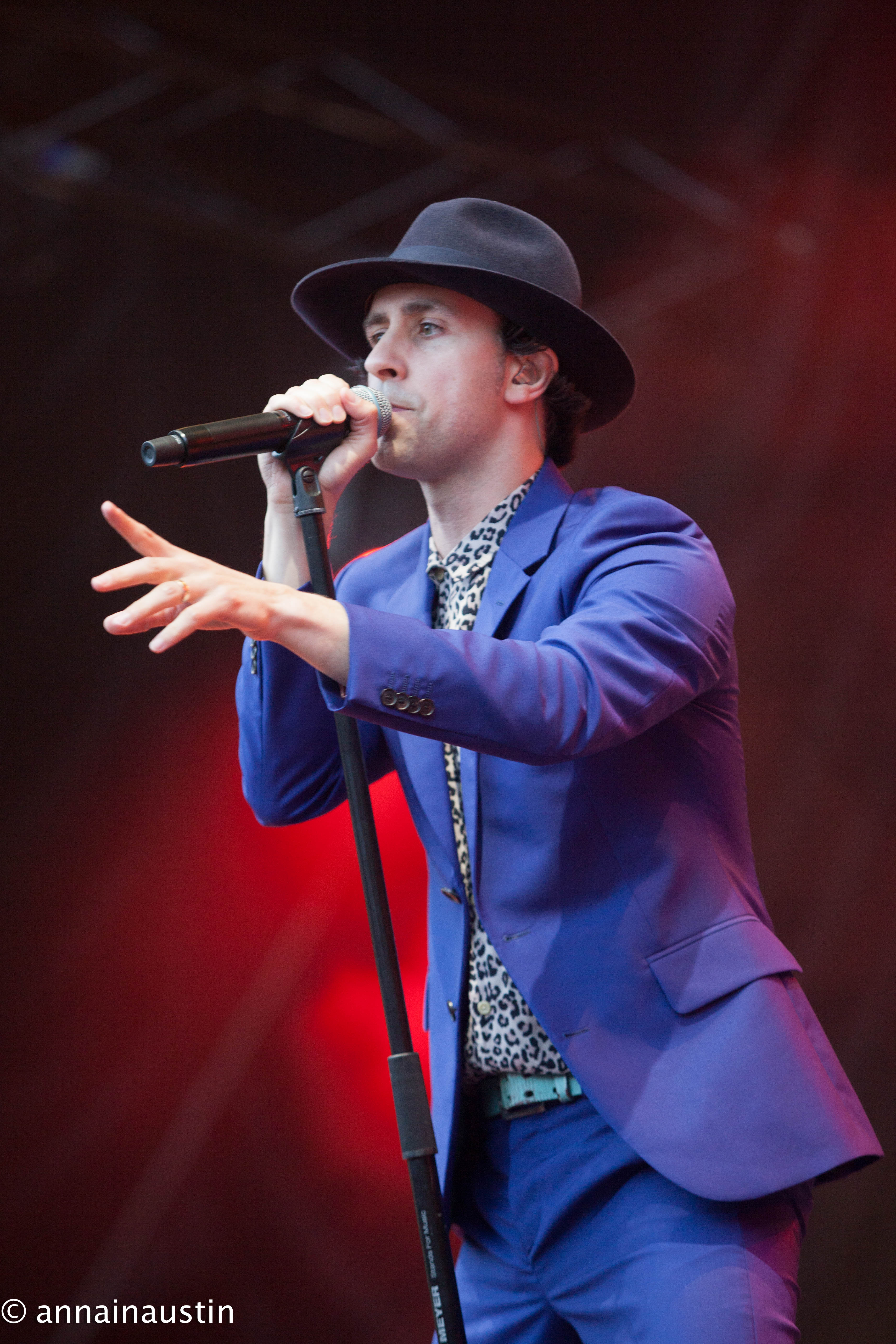 Maximo Park , Positivus Festival, Latvia, July 2017-1692.jpg